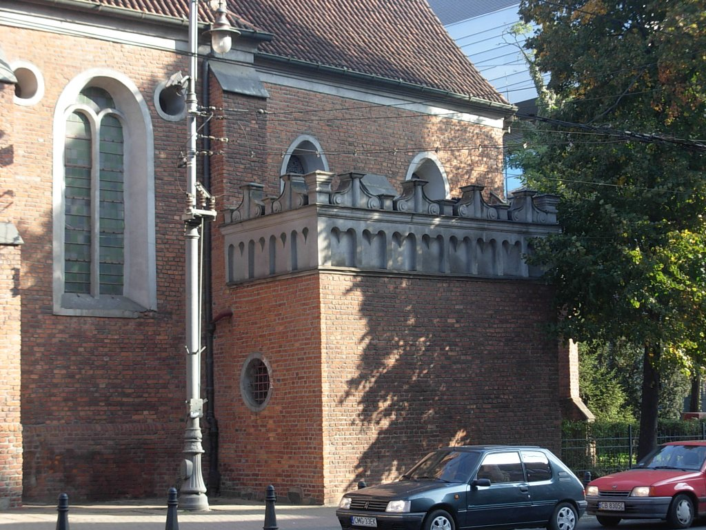 Kościół Klarysek p.w. Wniebowzięcia Najświętszej Maryi Panny w Bydgoszczy - kaplica Wojciecha Łochowskiego z 1646 r